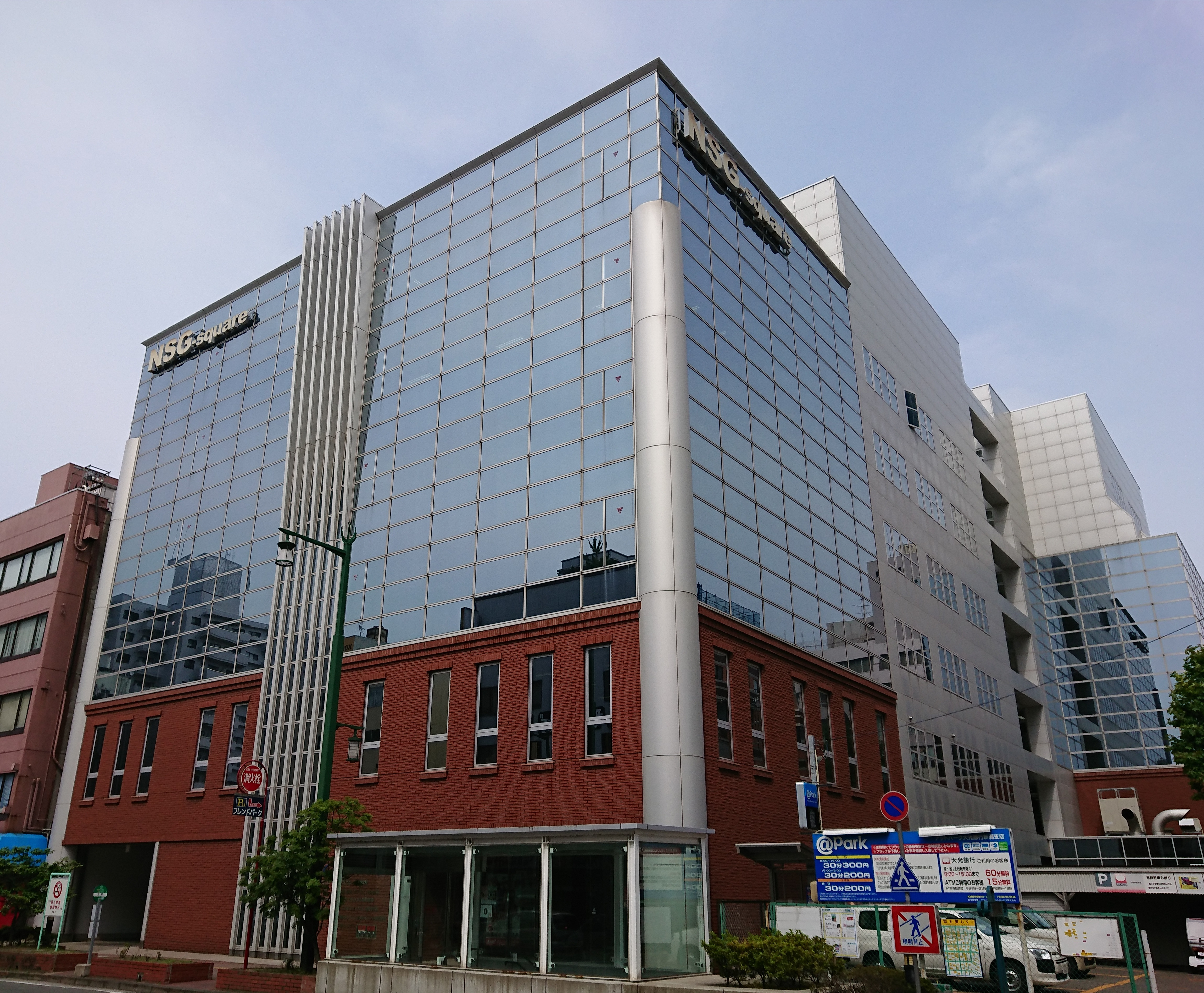 NSGスクエアの外観（新潟市中央区 古町）